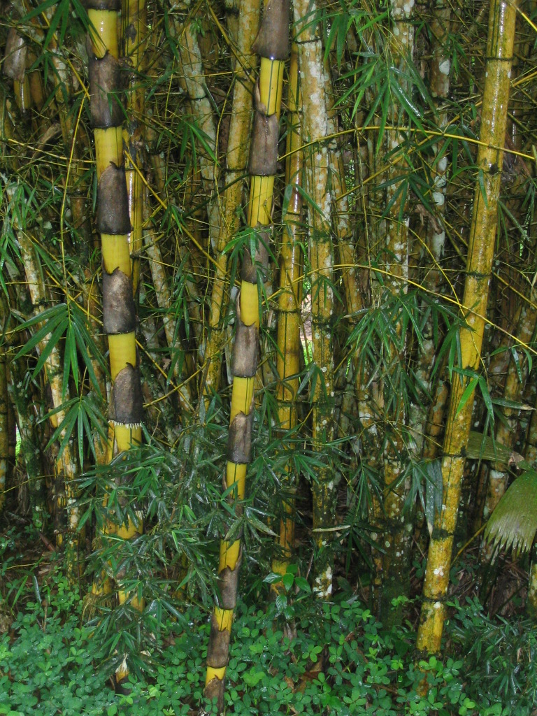 Giant Bamboo in Ecuador